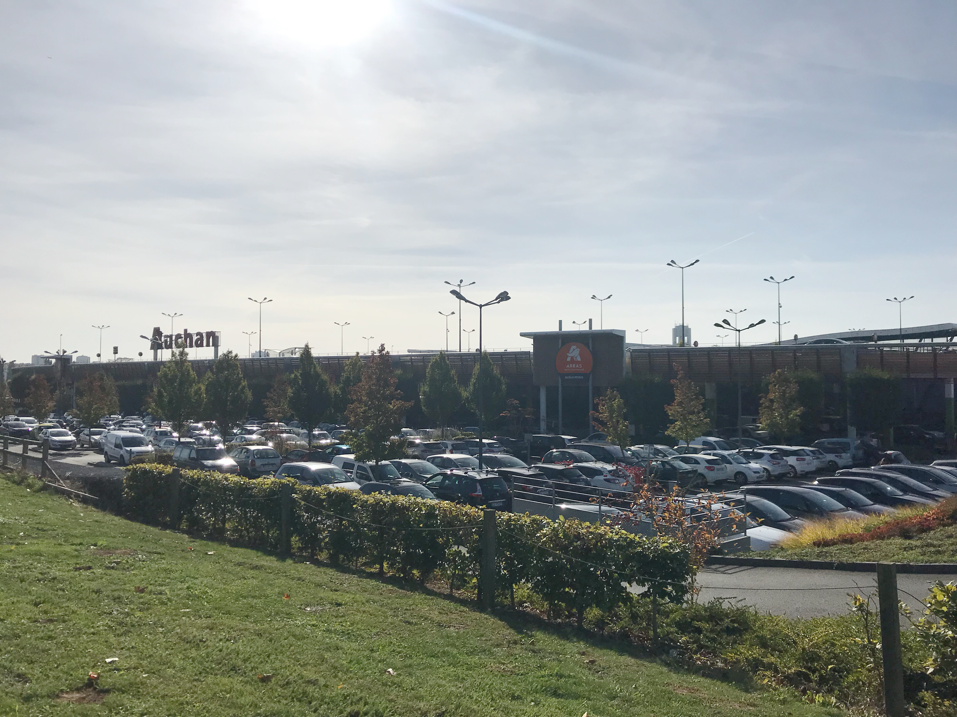 Centre commercial Arras Ouest (Aushopping)